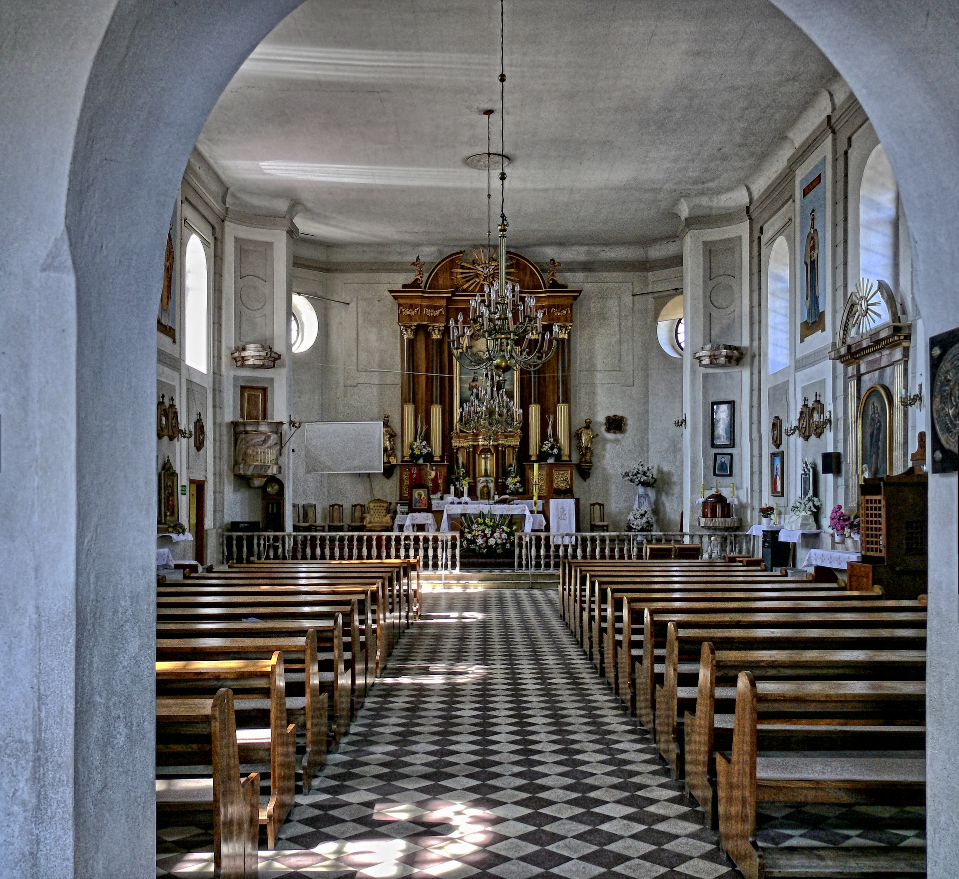 Wnętrze kościoła parafialnego p.w. Jana Chrzciciela w Łańcuchowie, dekanat Łęczna, województwo lubelskie.